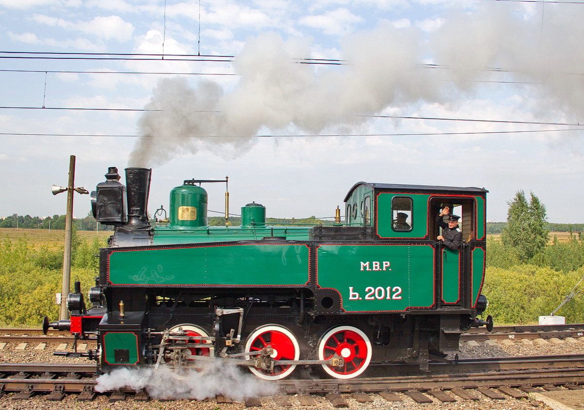 Построен для Владикавказской ж. д. как Т.1012 с 1900 г. — Т.2012 с 1912 г. — Ь.2012 (Ьк.2012) Работал в депо Рославль до 1985 г., после чего был там-же установлен памятником Паровоз попал под распоряжение №2380Р от 23.11.2012 "О сохранении и восстановлении работоспособности паровозного парка ОАО «РЖД»", как подлежащий включению в инвентарный парк и восстановлению до рабочего состояния В марте 2016 г. перевезён в депо Подмосковная Восстановлен в августе 2017 г. силами ООО «Ретросервсис» (депо СПб-Сортировочный-Московский). В сентябре 2017 был участником динамической экспозиции на Expo1520. Ныне самый старый действующий паровоз в инвентарном парке ОАО «РЖД»